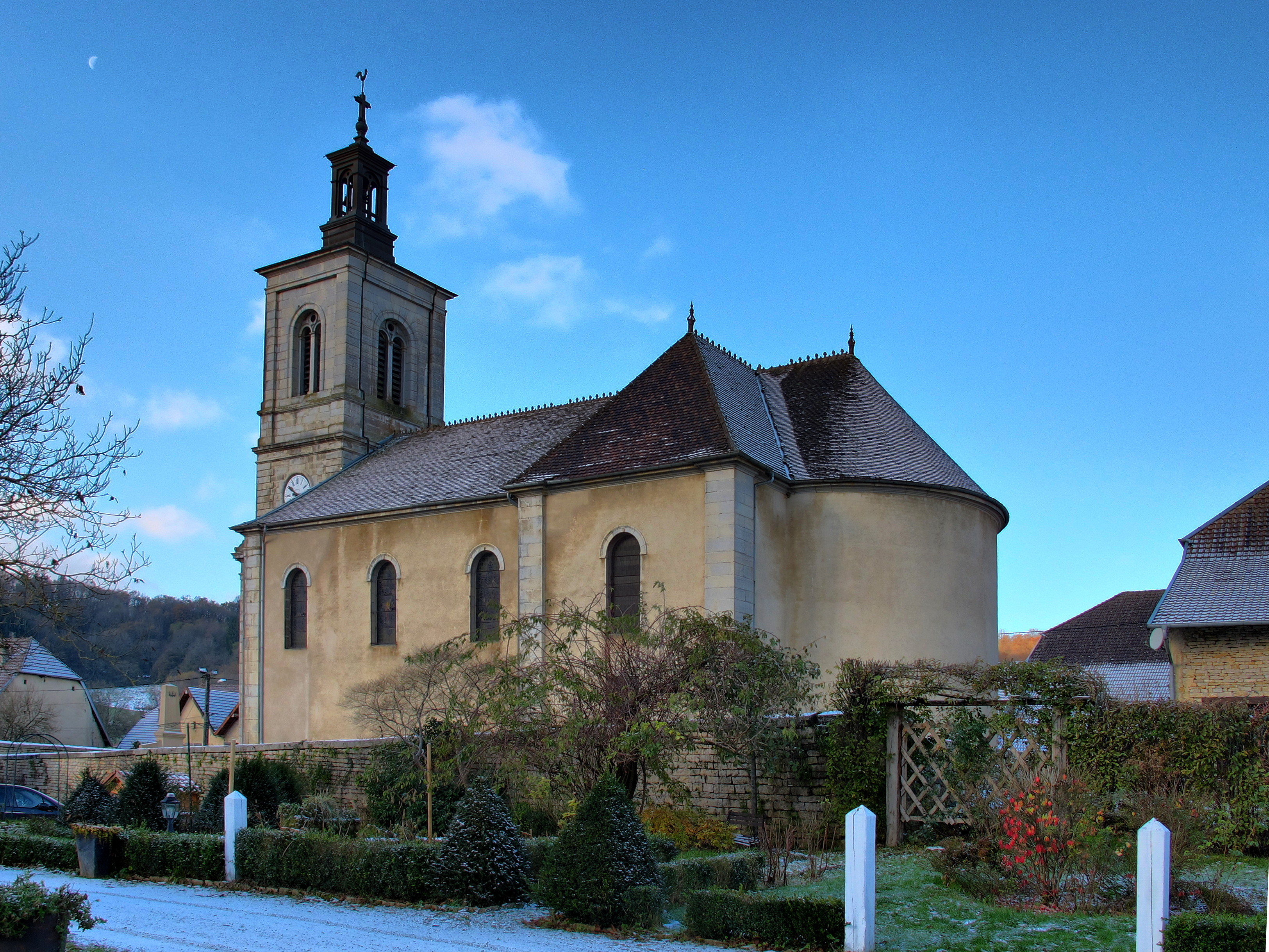 Inscrit aux monuments historiques sous le numéro PA00101780